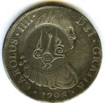 Resello con ave y leyenda en árabe estampado sobre diferentes monedas extranjeras en 1870